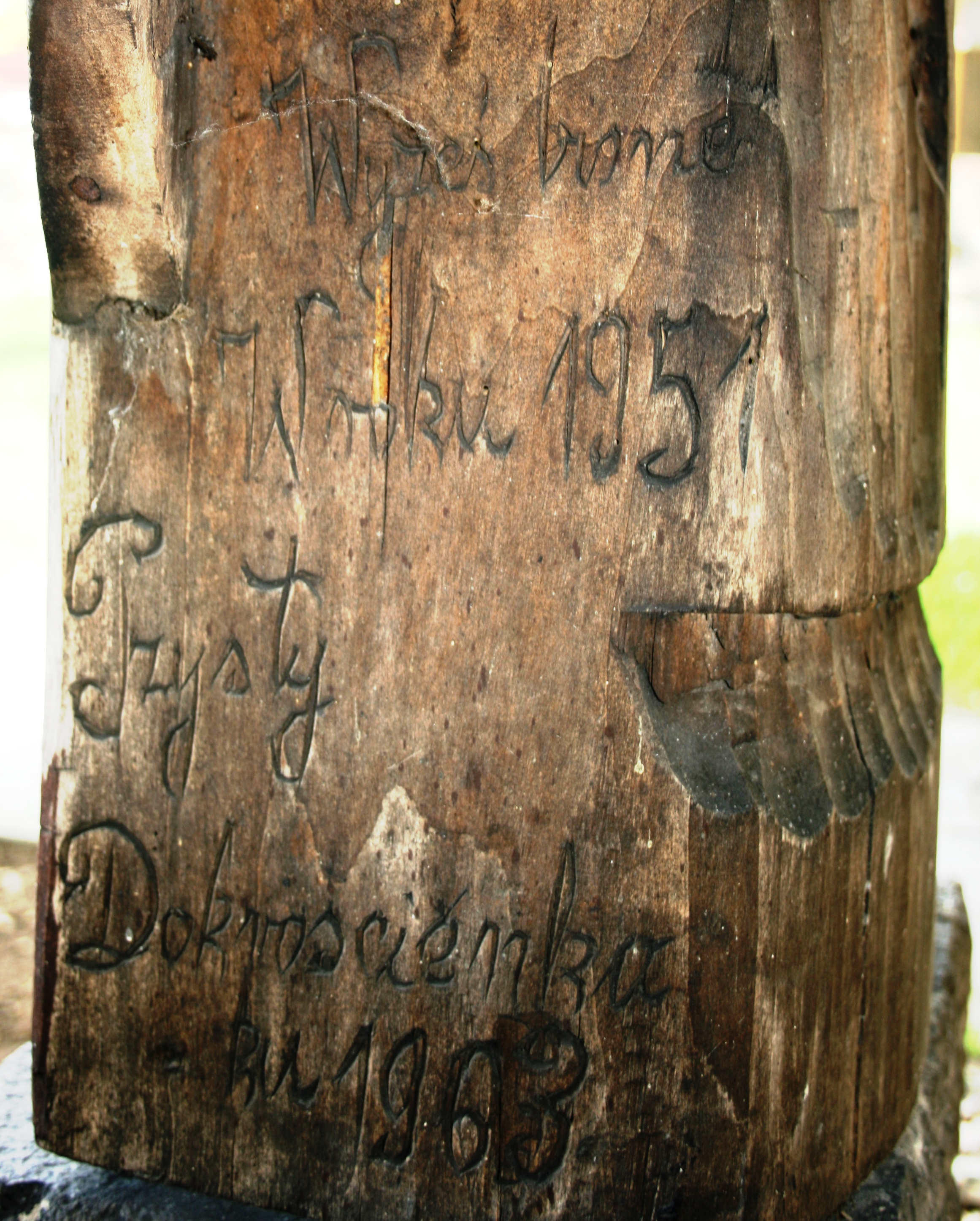 Podpis pod rzeźbą Męka Pańska Józefa Janosa przed kościołem Wszystkich Świętych w Krościenku nad Dunajcem